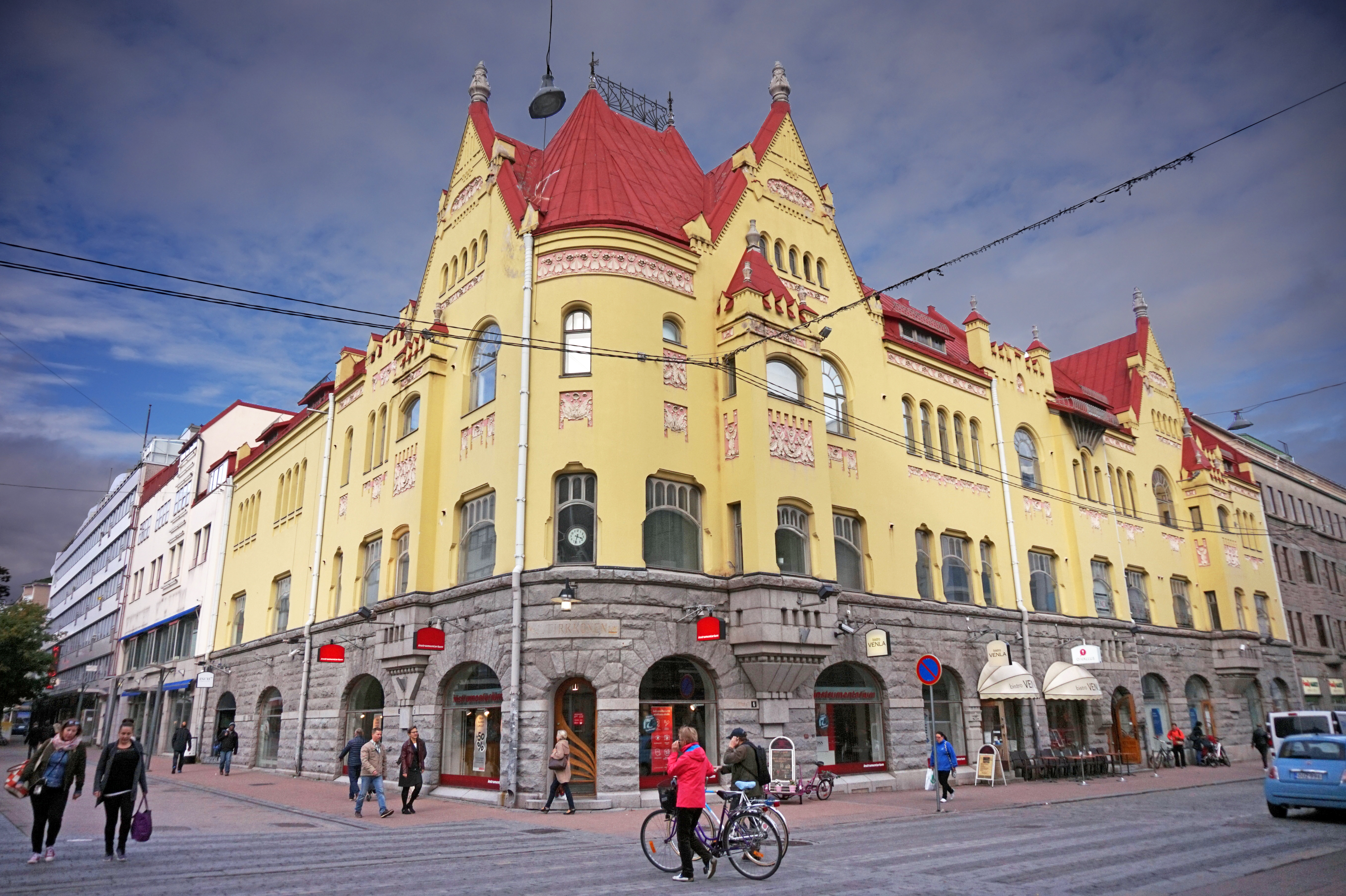 Tirkkosen talo. Kauppakatu 6, Tampere.